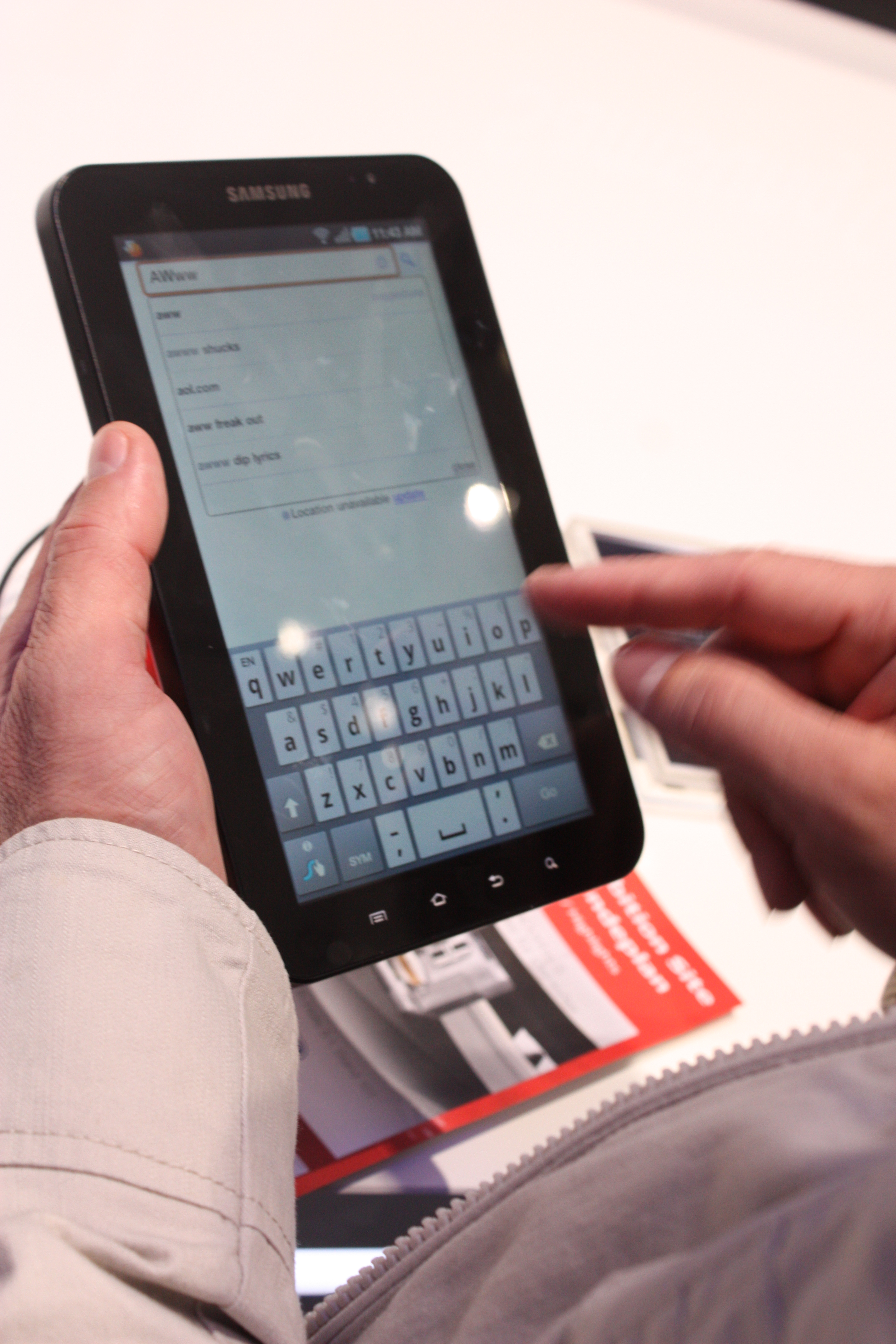 IFA 2010, Berlin